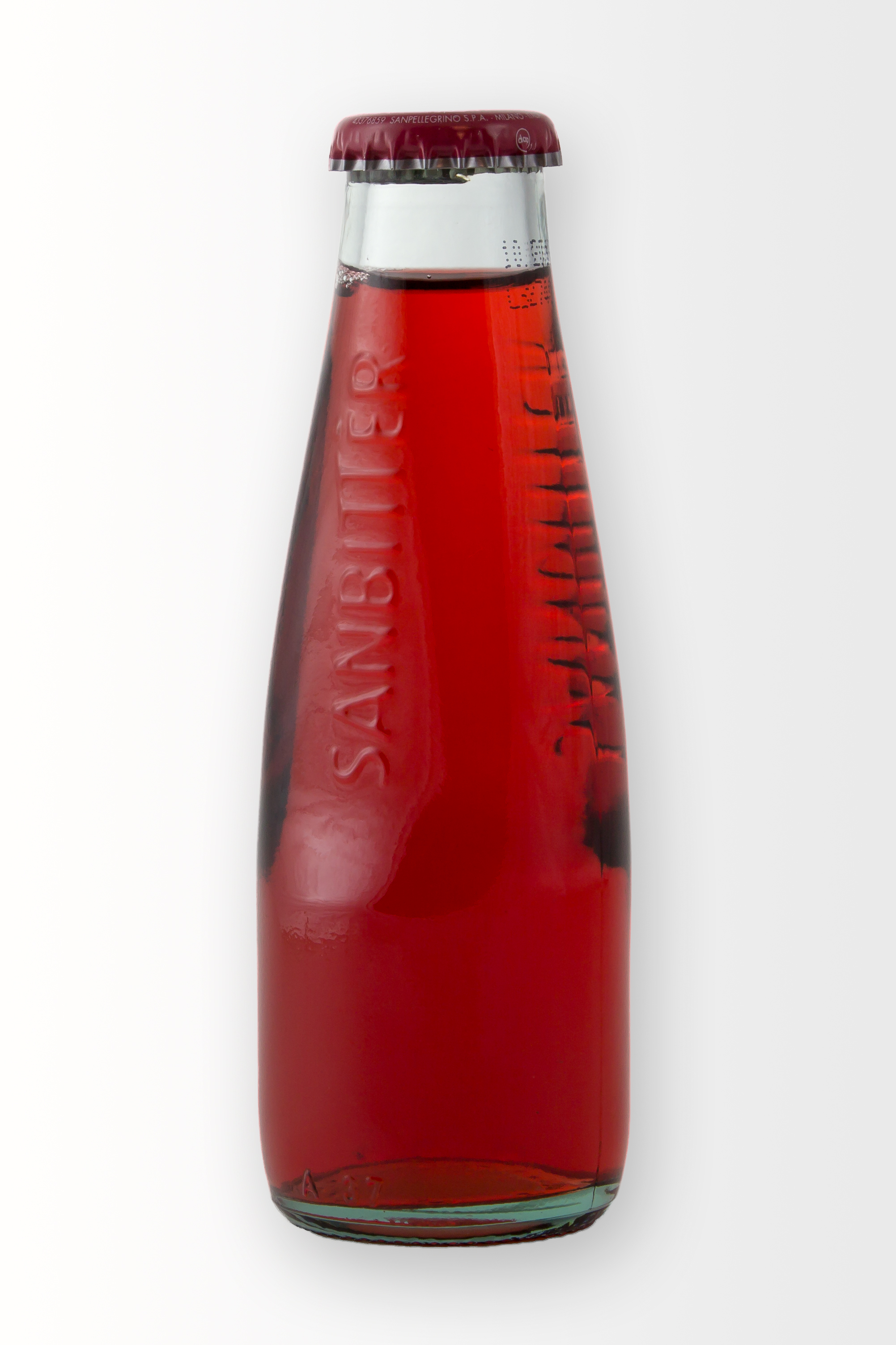 Kleine Flasche Sanbitter